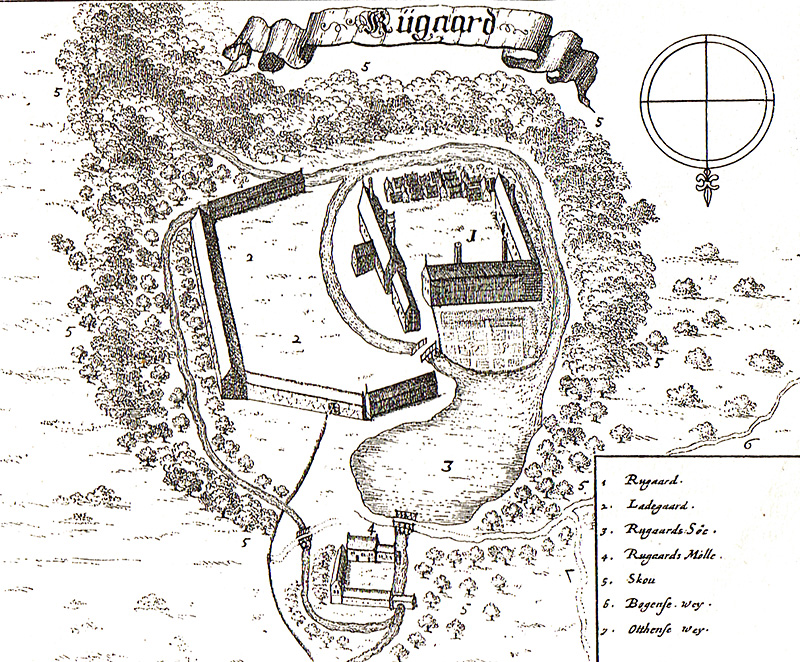 Rugård er en gammel kongsgård, som nævnes første gang i 1472. Rugaard ligger i Veflinge Sogn, Skovby Herred, Søndersø Kommune. Hovedbygningen er opført i 1874 ved Knud Borring.